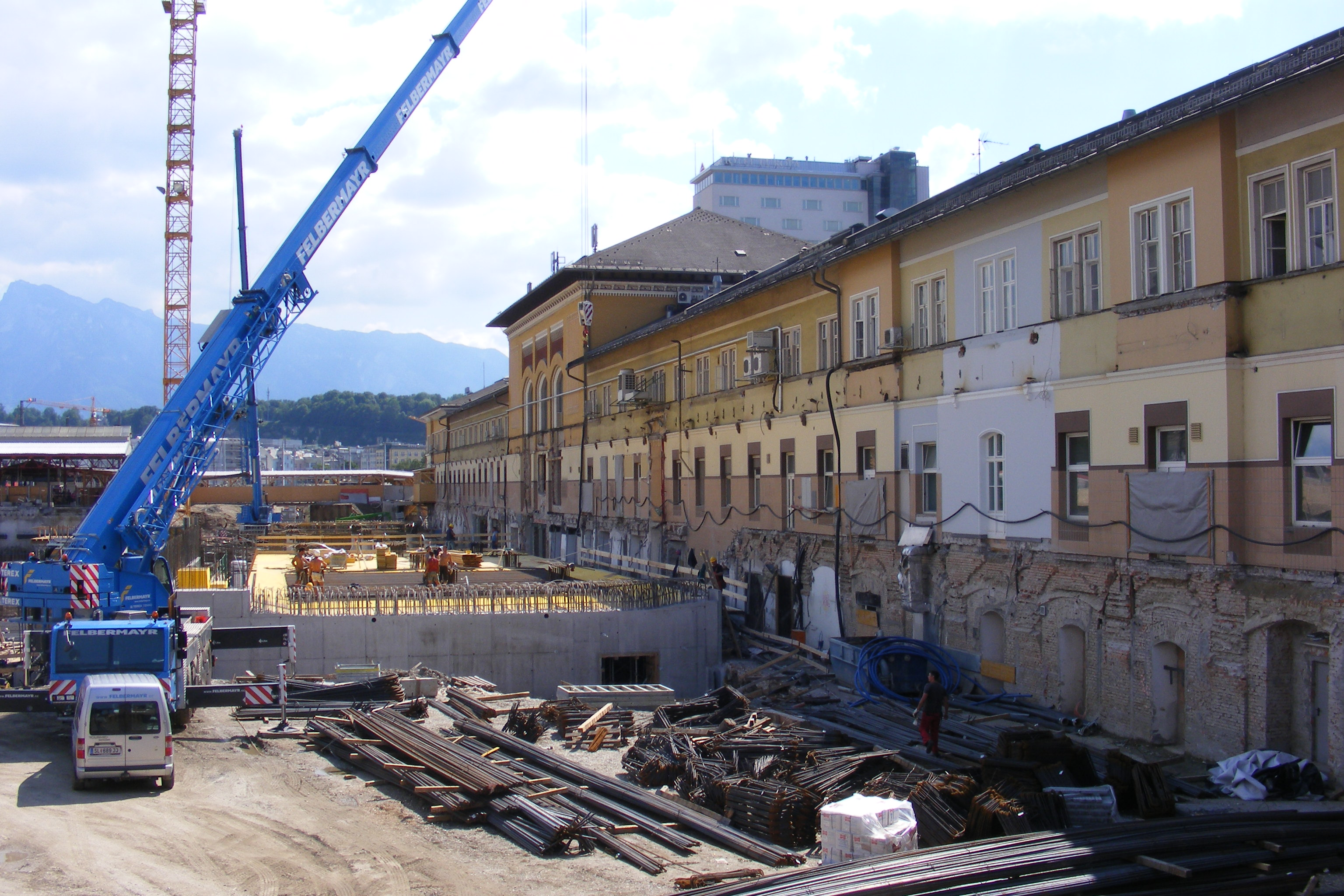 Umbau des Salzburger Hauptbahnhofs 2010